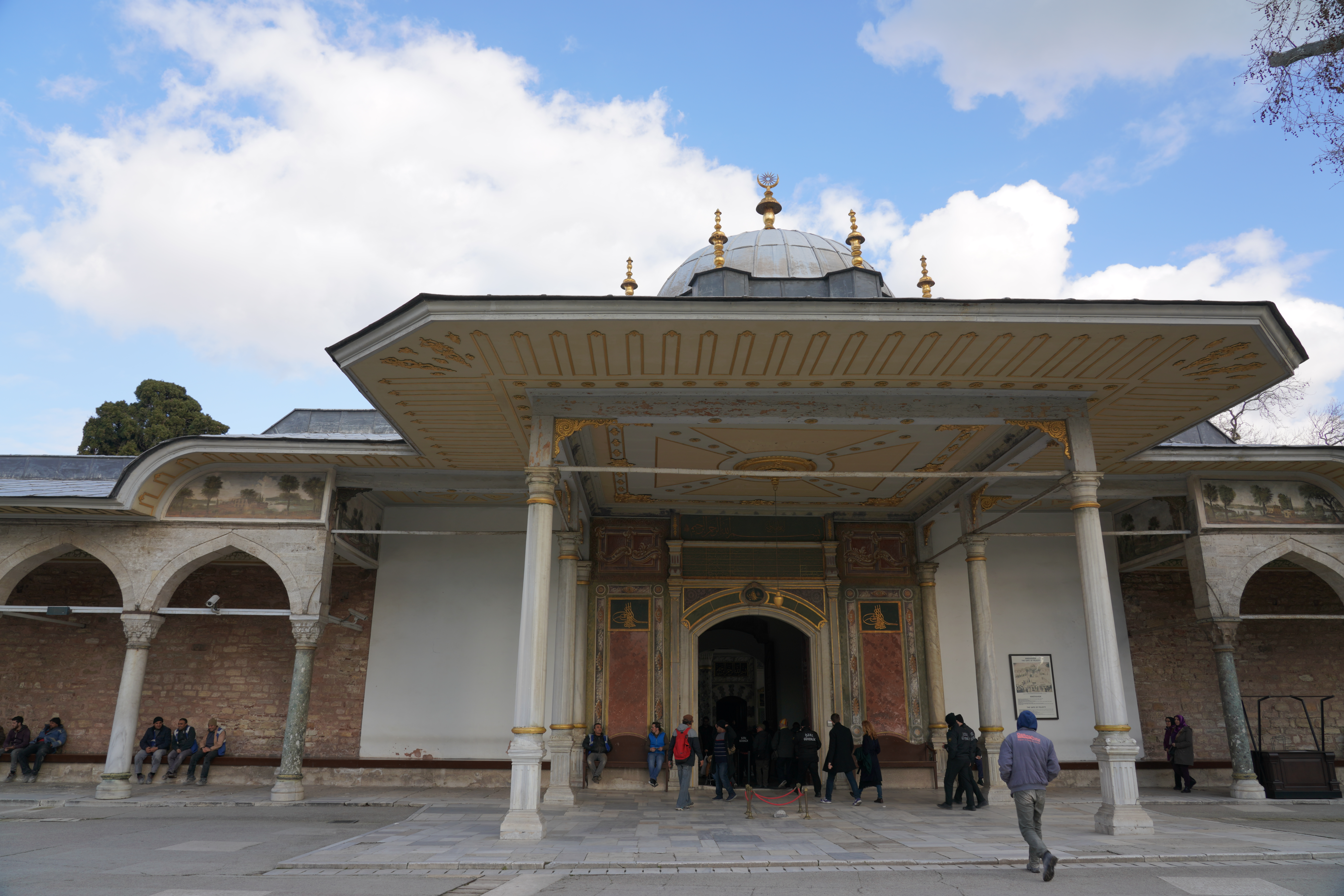 20180115_Topkapi_8175